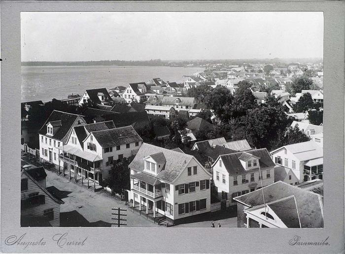 Negatief. Stadsgezicht van Paramaribo gezien vanaf de toren van het Administratiegebouw op het gouvernementsplein. Op de voorgrond de Mr Dr J.C. de Mirandastraat, vroeger Oranjestraat.